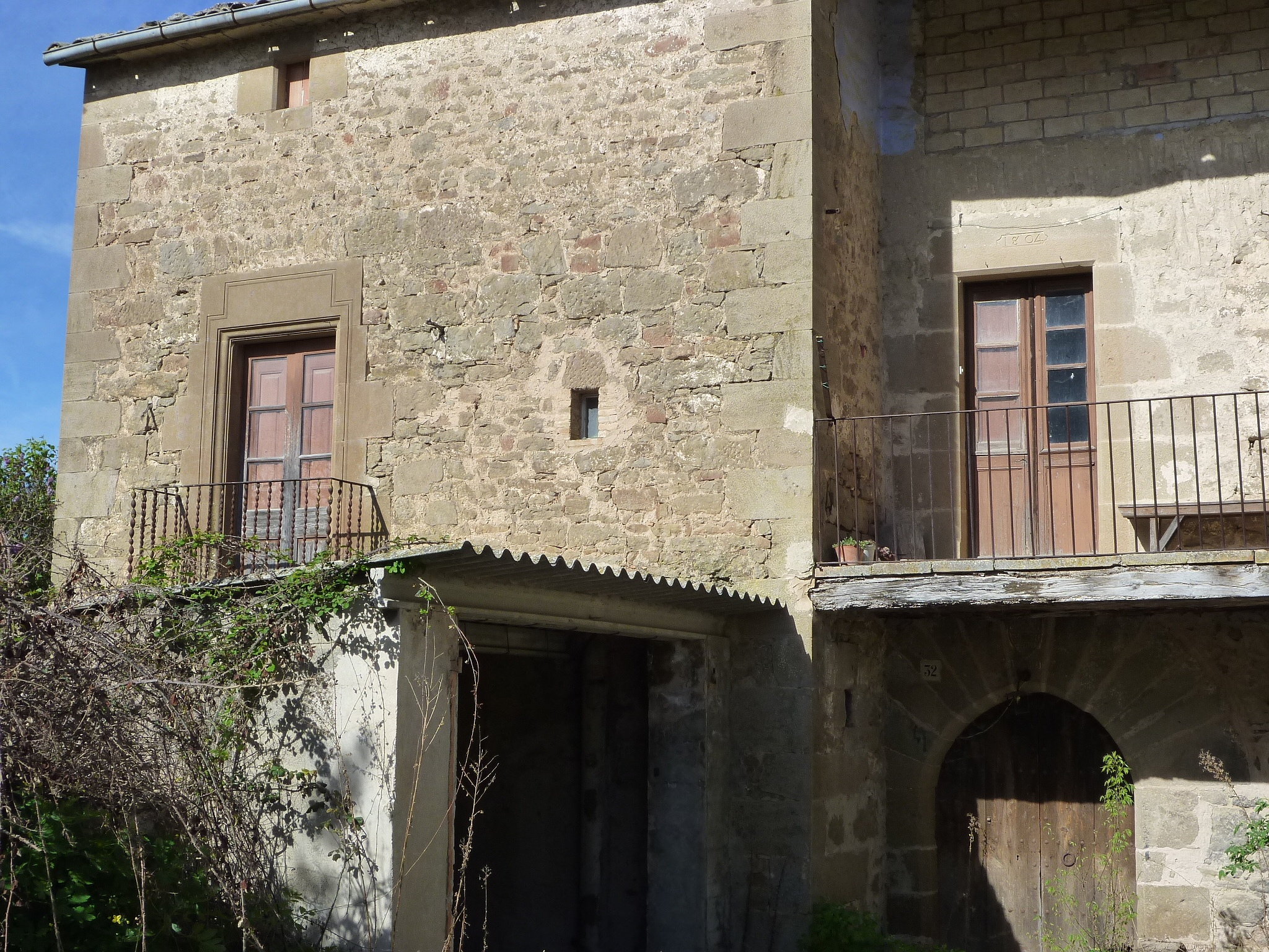 Casa de la Rectoria, al nuli de Su, del municipi de Riner